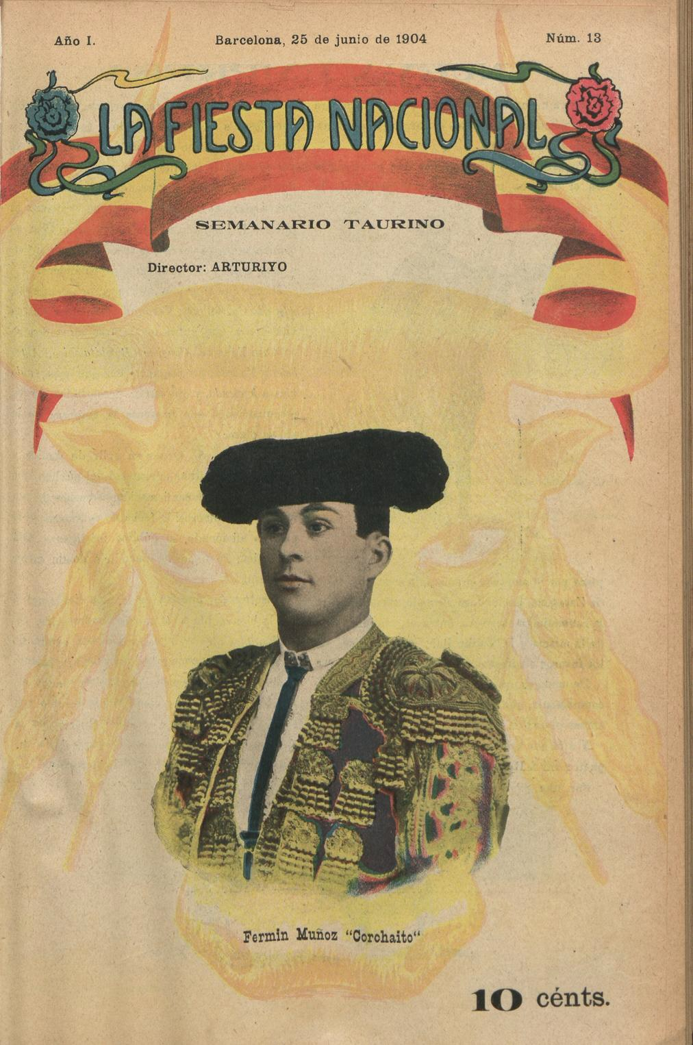 Fermín Muñoz, Corchaito, cubierta de La Fiesta Nacional, semanario taurino dirigido por Arturiyo, Barcelona, 25 de junio de 1904